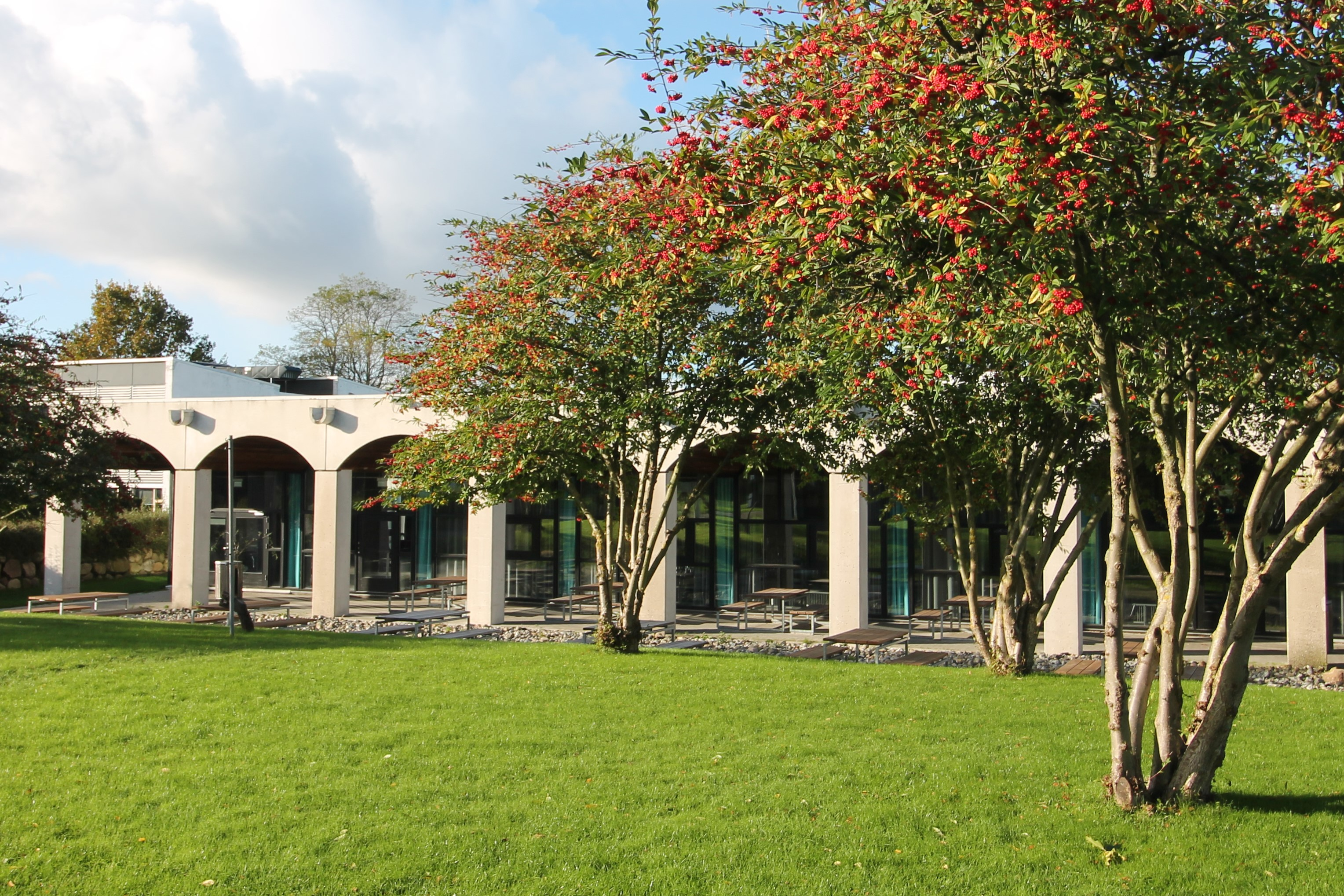 Gladsaxe Gymnasium